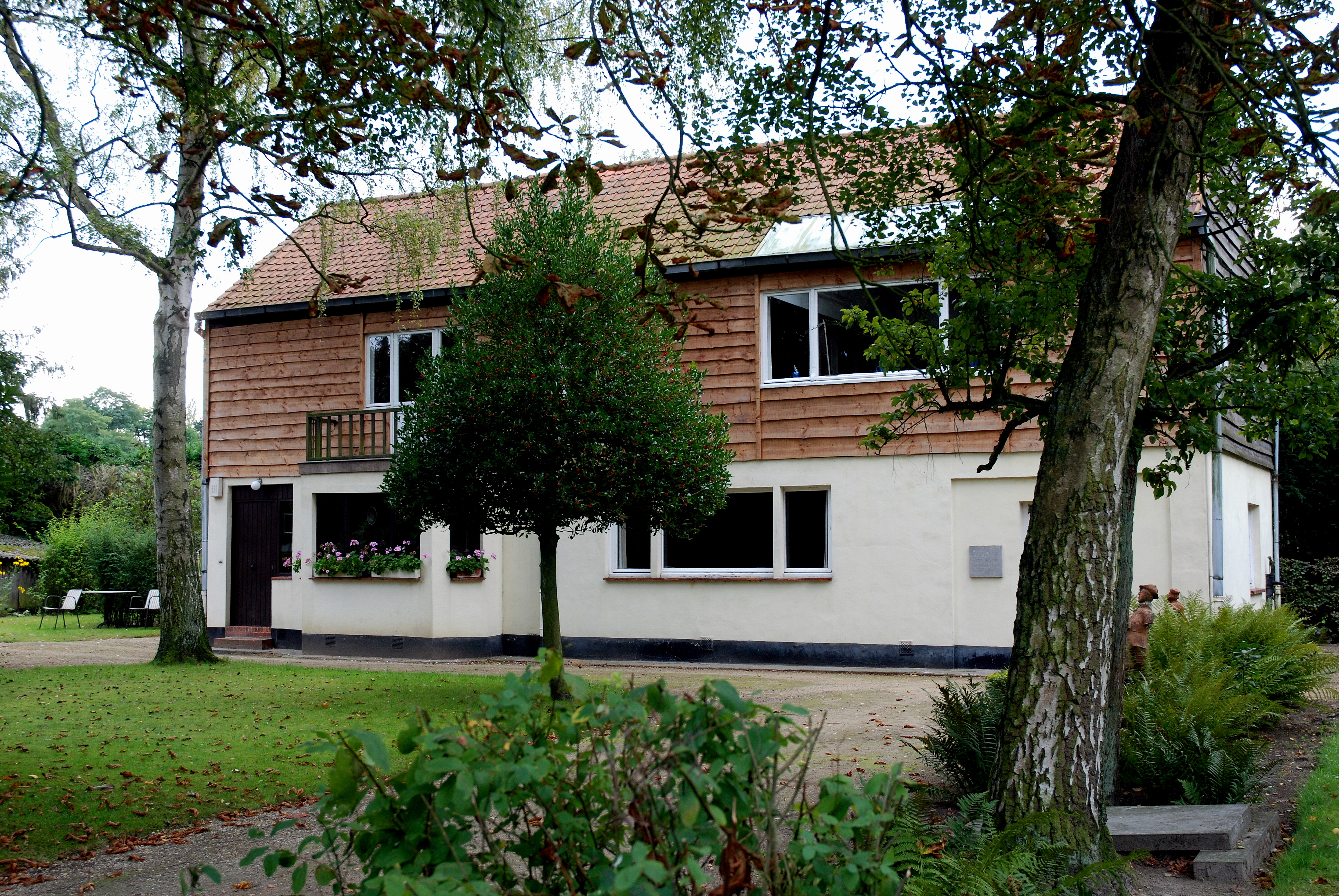 Het Gustaaf De Smetmuseum in Deurle, België